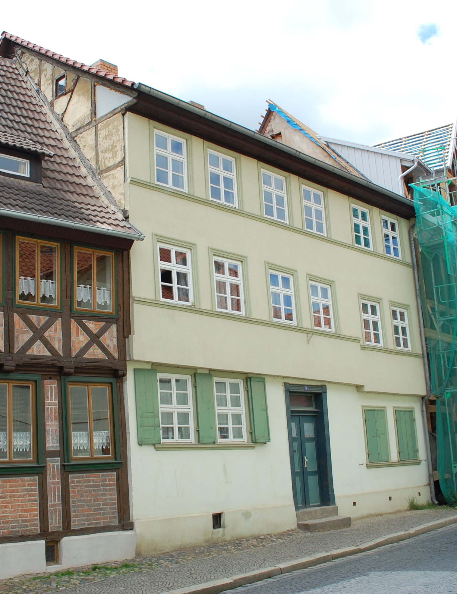 Haus in der Straße Kaplanei in Quedlinburg